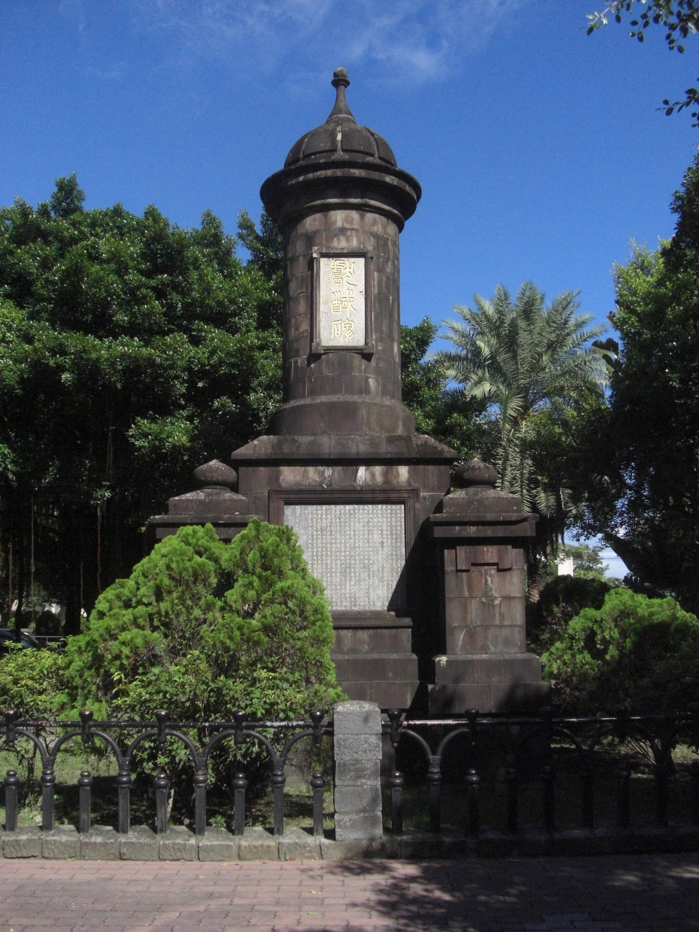 中文（台灣）: 臺灣省宜蘭縣縣定古蹟（三級古蹟）獻馘碑。